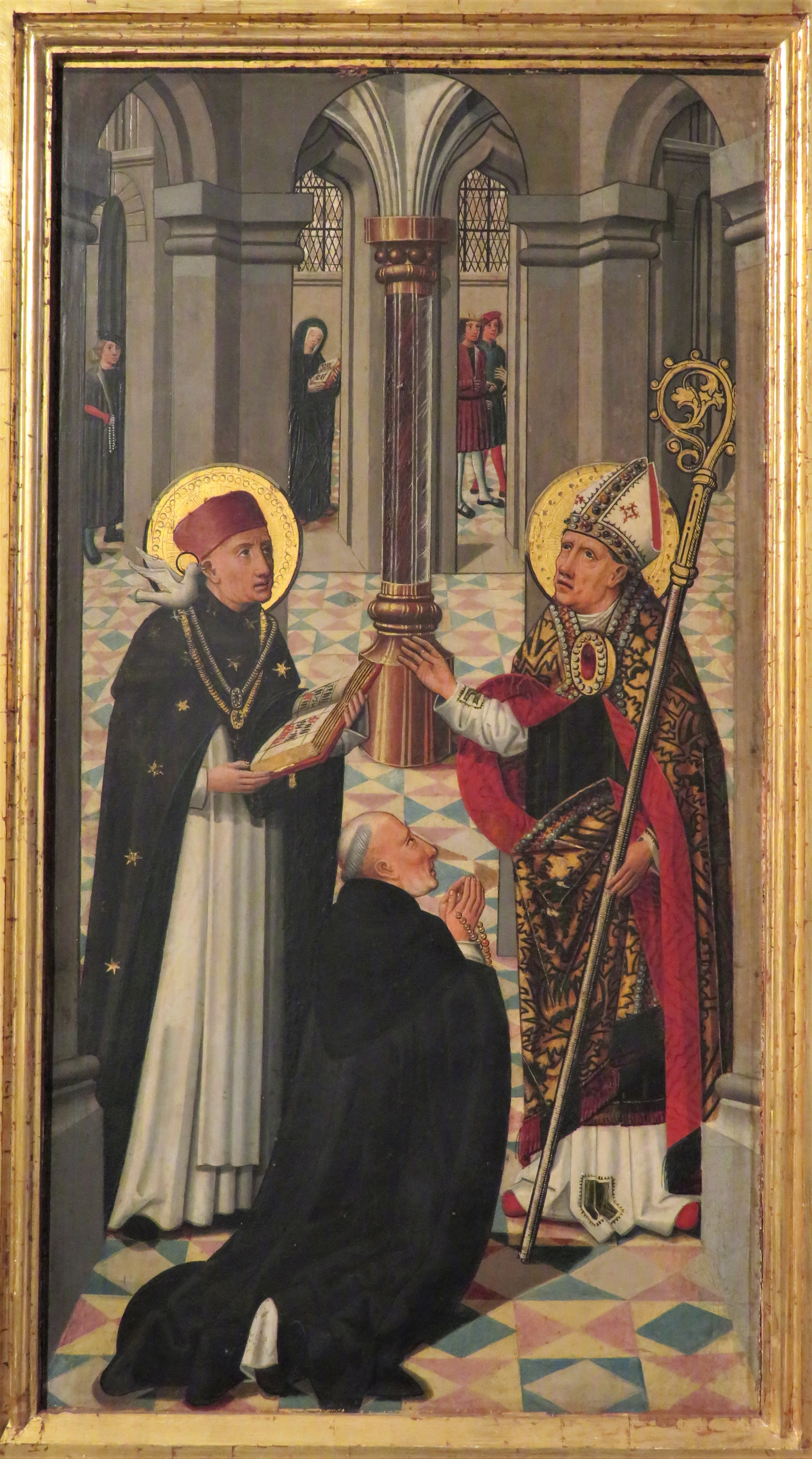 Flügelretabel der Thomasbruderschaft der Brauerknechte (Thomas-Altar), Lübeck, Sulpturen: Meister der Burgkirchenaltäre zugeschrieben; Gemälde Meister des Thomasaltars; Standflügel: Erhart Altdorfer, um 1520, aus der Burgkirche, vor 1848 im Sammlungsbestand der Lübecker Musseen, heute im St.-Annen-Museum; Detail: unteres Bildfeld der Innenseite des rechten Aussenflügels: Vision des Albert von Brescia